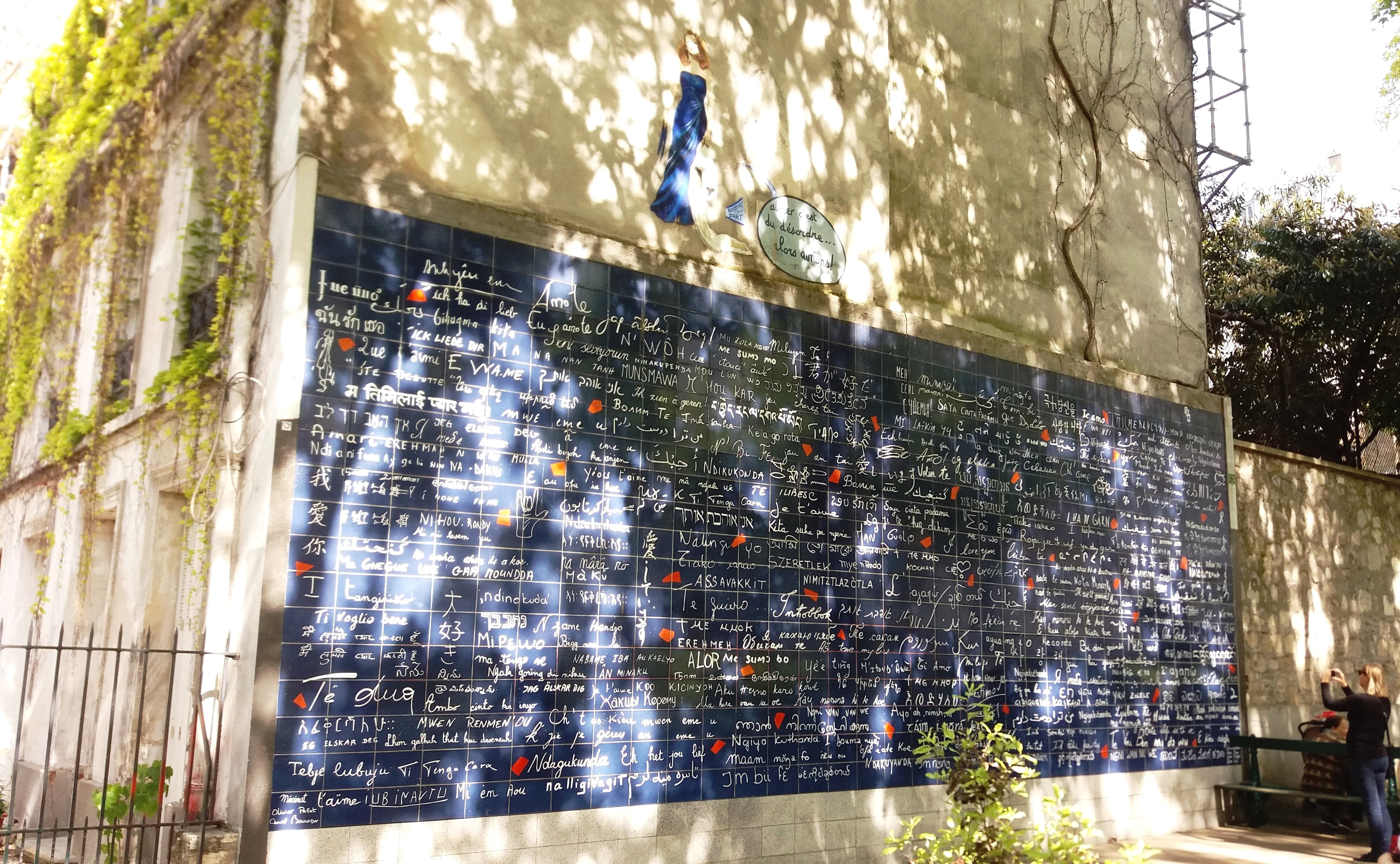 Le mur des je t'aime Paris Montmarte; Gesamtansicht.